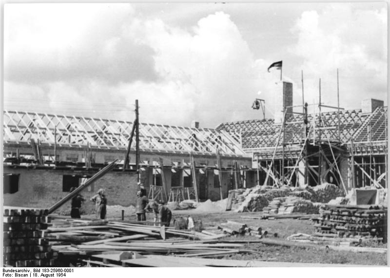 Warmsdorf, Rohbau der MTS Zentralbild Biscan 18.8.1954 Die Richtkrone über einer neuen MTS. Die MTS Warmsdorf, Kreis Stassfurt, besteht schon einige Jahre und hat den werktätigen Bauern schon unschätzbare Dienste geleistet. Sie ist aber nur behelfsmässig untergebracht und war dadurch in ihrer Arbeit gehindert. Ein großzügiger Neubau, über dem bereits die Richtkrone hängt, wird diesen Zustand in wenigen Wochen ein Ende bereiten. UBz: Der Neubau der MTS Warmsdorf geht seiner Vollendung entgegen. Im Herbst werden die neuen Arbeitsräume, Werkstätten und Garagen bezogen.